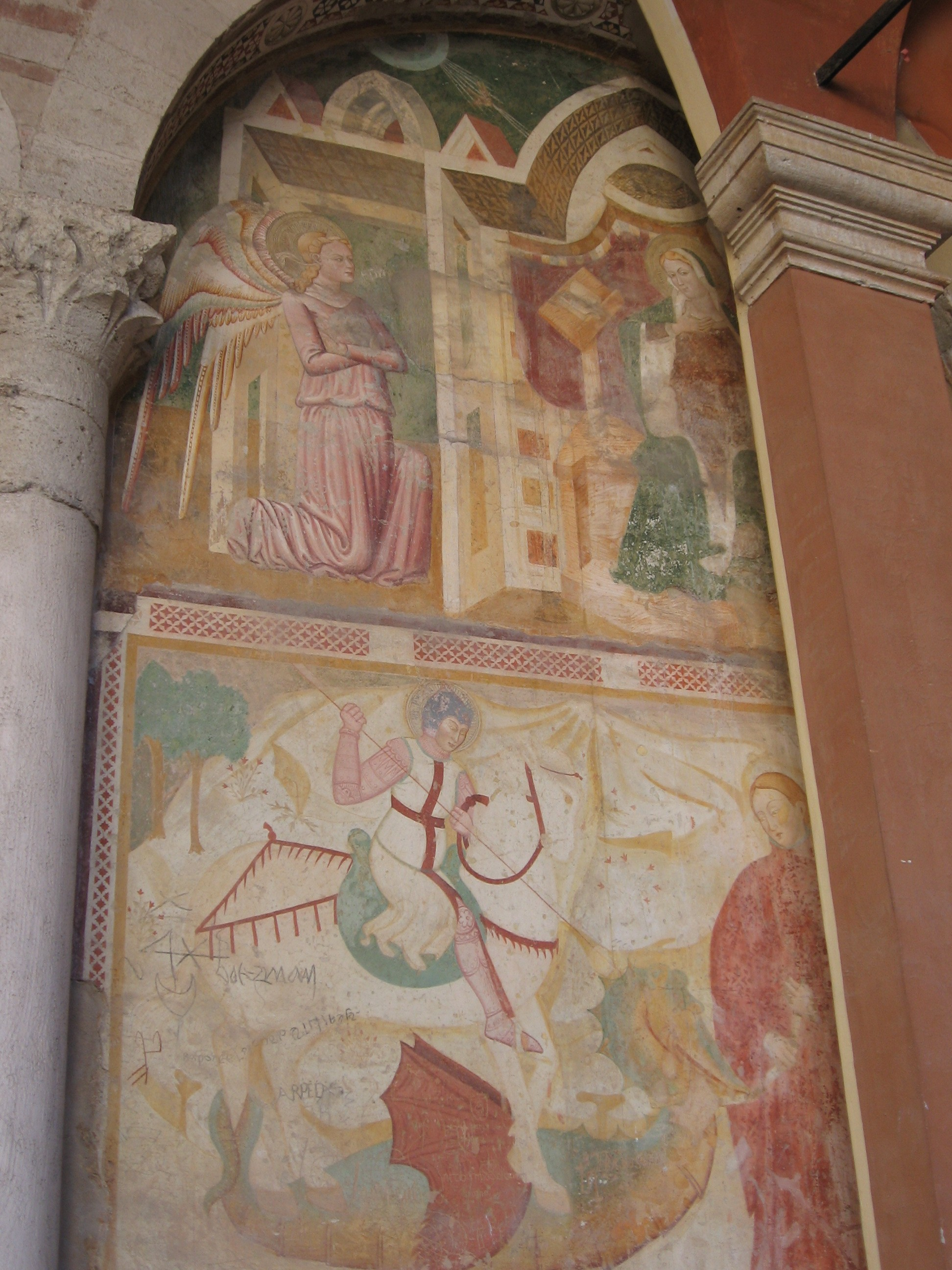 Perugia, settembre 2006Perugia